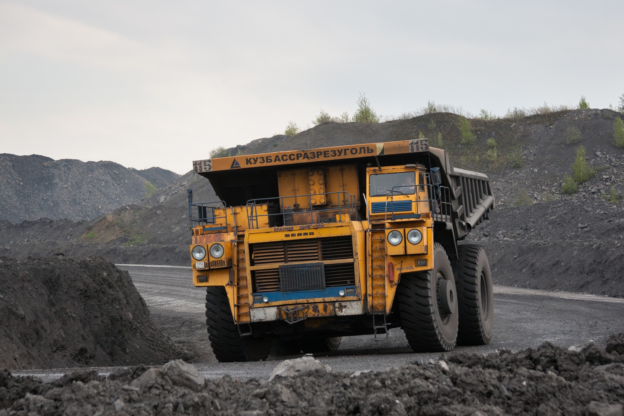 Карьерный самосвал БелАЗ на Бачатском угольном разрезе, Кемеровская область. Самосвал БелАЗ-7530.